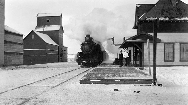 Залізнична станція в Мондері, Альберта, Канада.